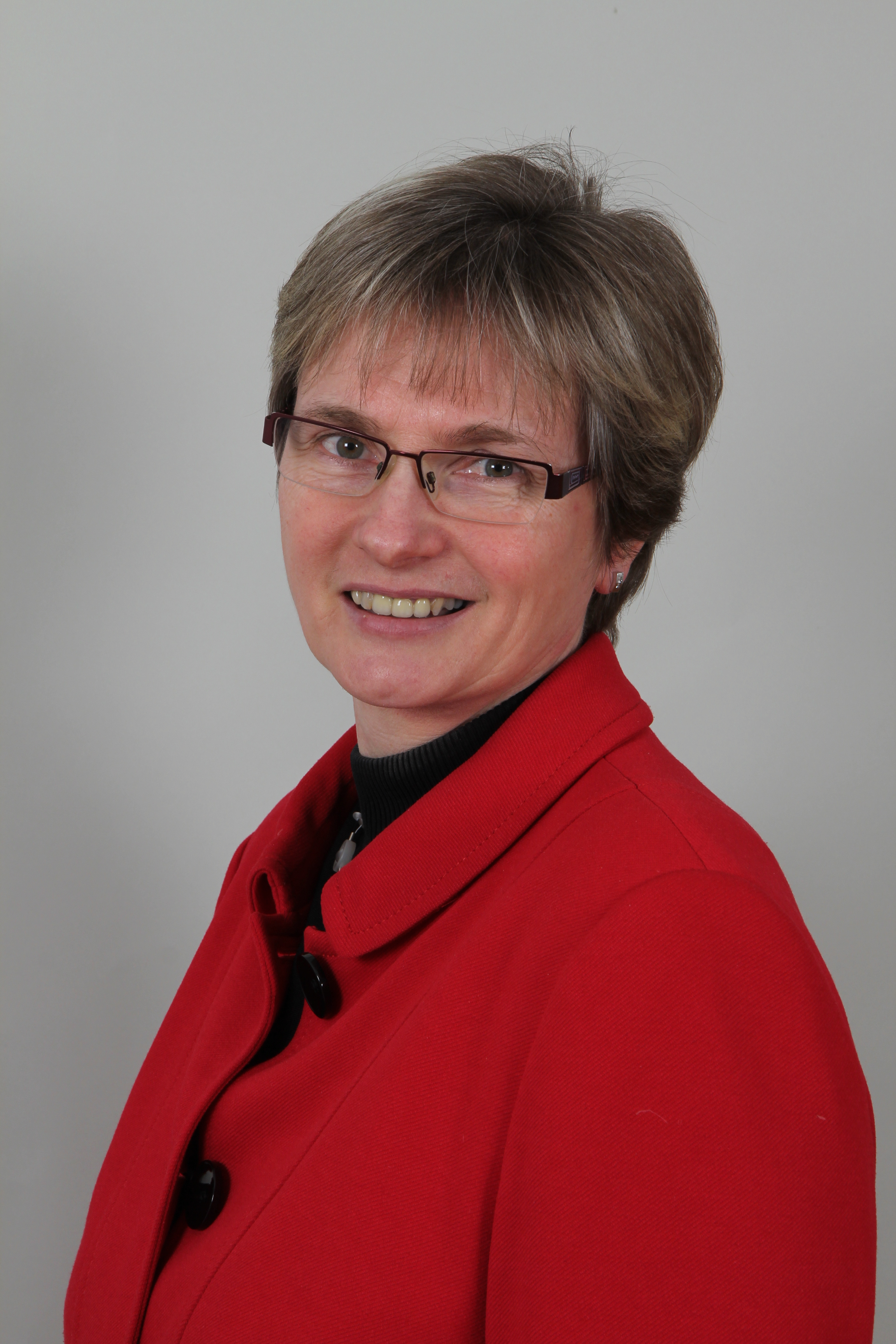 Claudia Ravensburg, hessische Politikerin (CDU) und Abgeordnete des Hessischen Landtags.